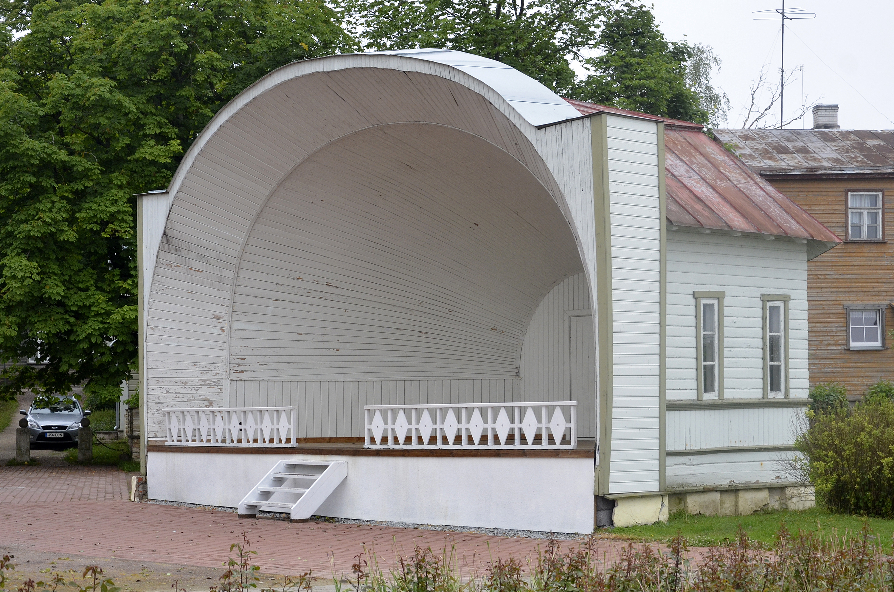 Kõlakoda Haapsalu promenaadil